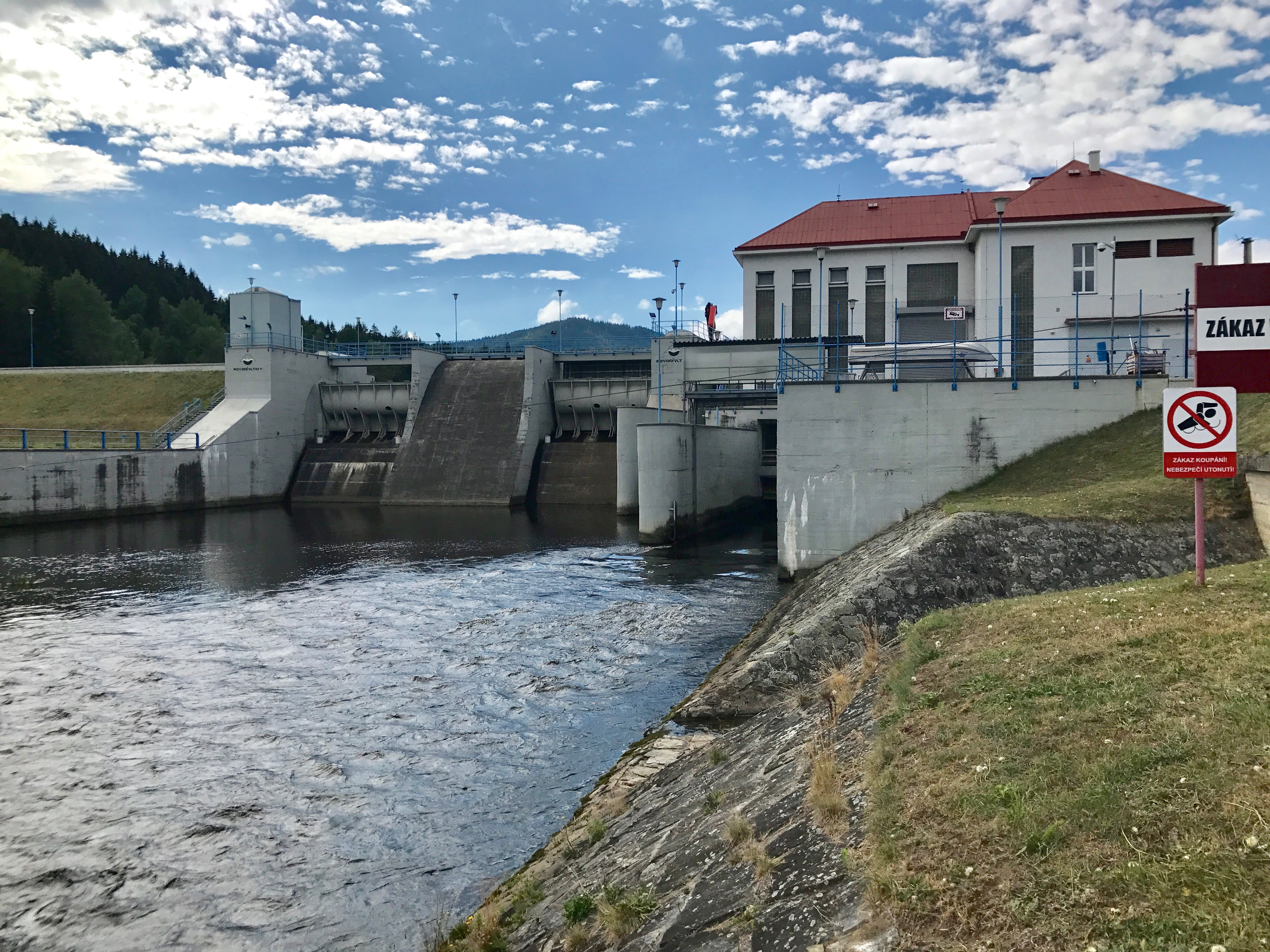 Vyrovnávací elektrárna Lipno II (Lipno 2) u Vyššího Brodu